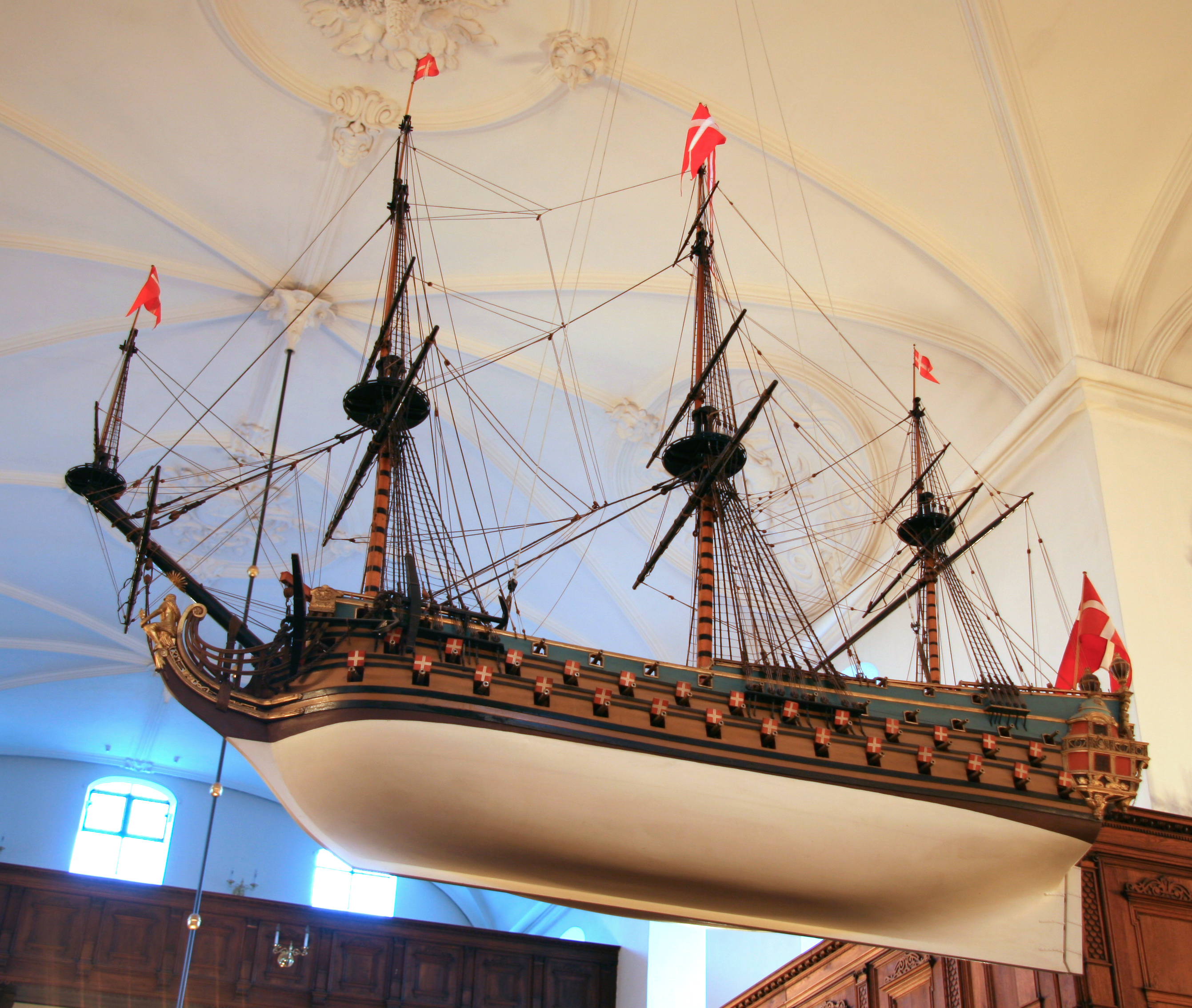 Holmens Kirke, Copenhagen, Denmark . Kirkeskibet. Model af Christianus Quintus.